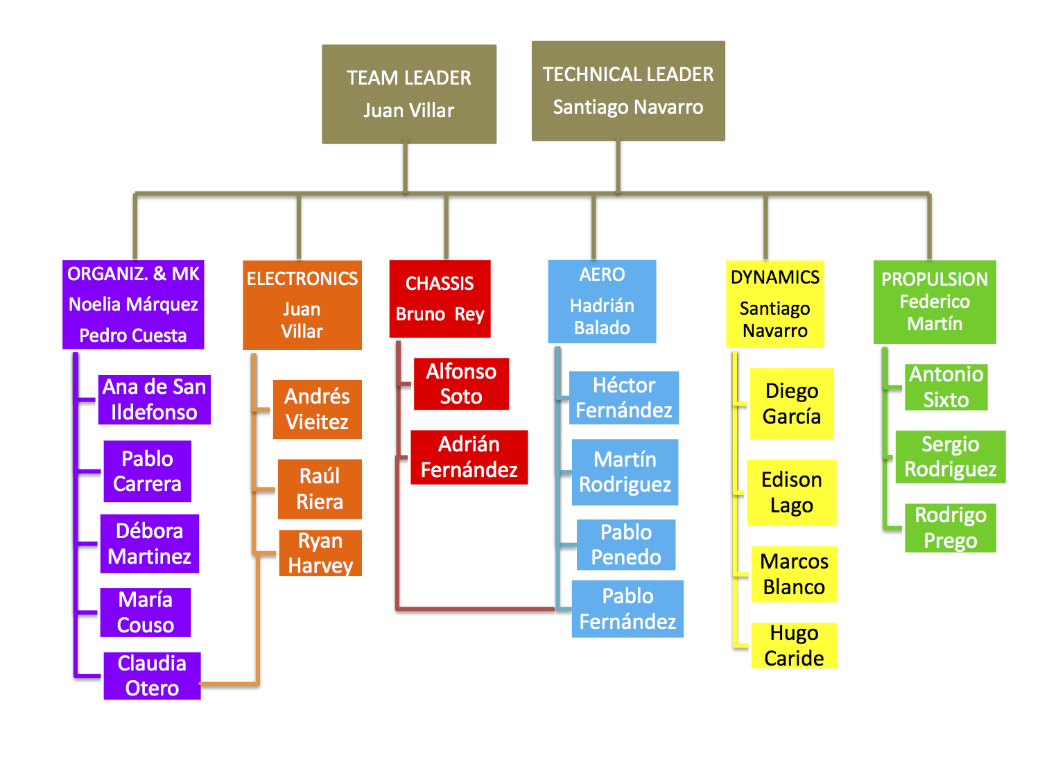 Organigrama de UVigo Motorsport en la temporada 2016-2017